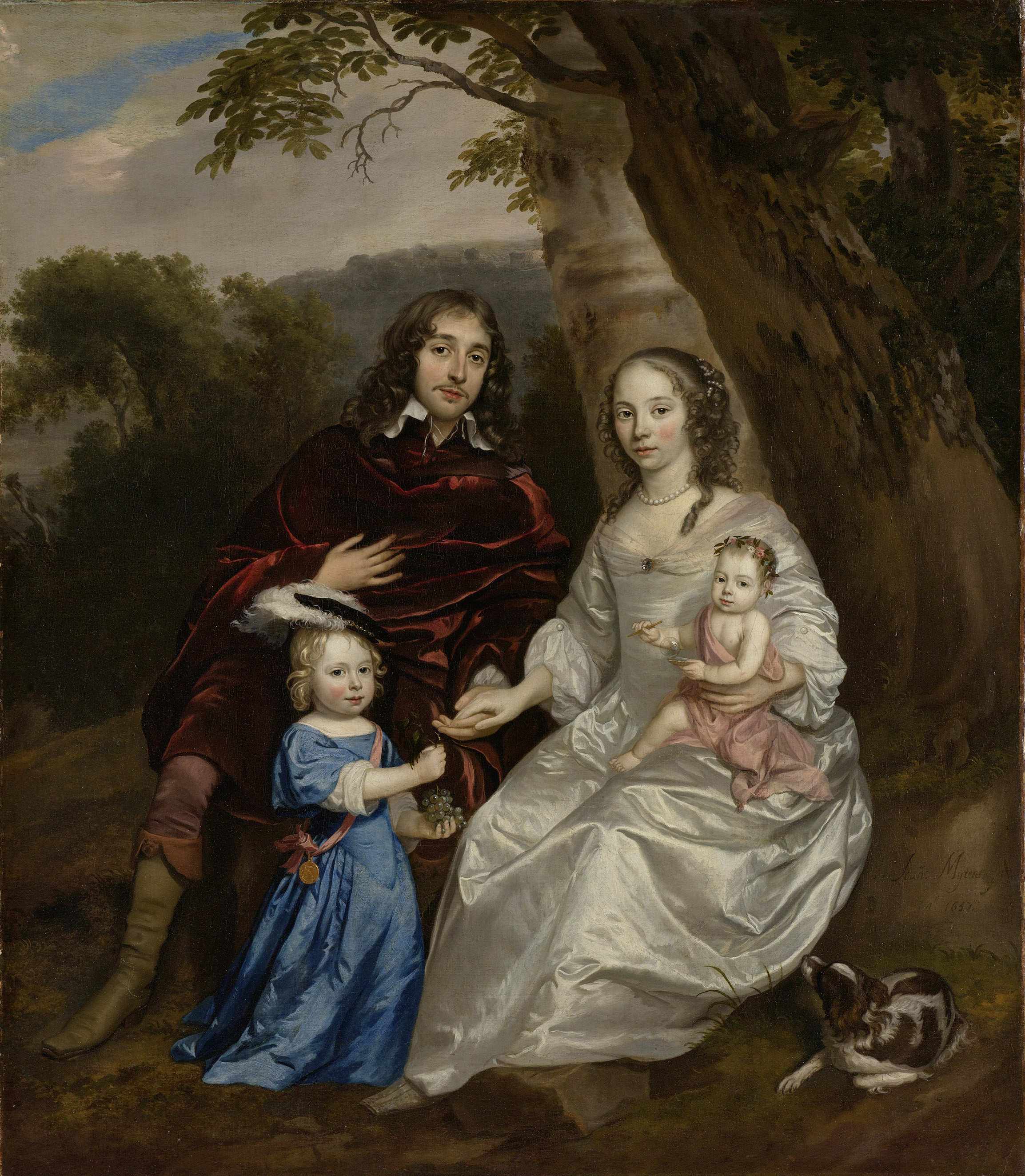 Familieportret van Govert van Slingelandt, heer van Dubbeldam, pensionaris van Dordrecht. Met zijn eerste vrouw Christina van Beveren en hun beide zoontjes zittend onder een boom in een landschap. De oudste zoon heeft een tros druiven in de handen. De jongste zoon zit bij zijn moeder op schoot en blaast bellen. Rechts een hondje.